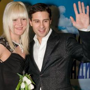 Антон Макарский с супругой на премьере фильма «Возвращение мушкетёров» 4 февраля 2009 года